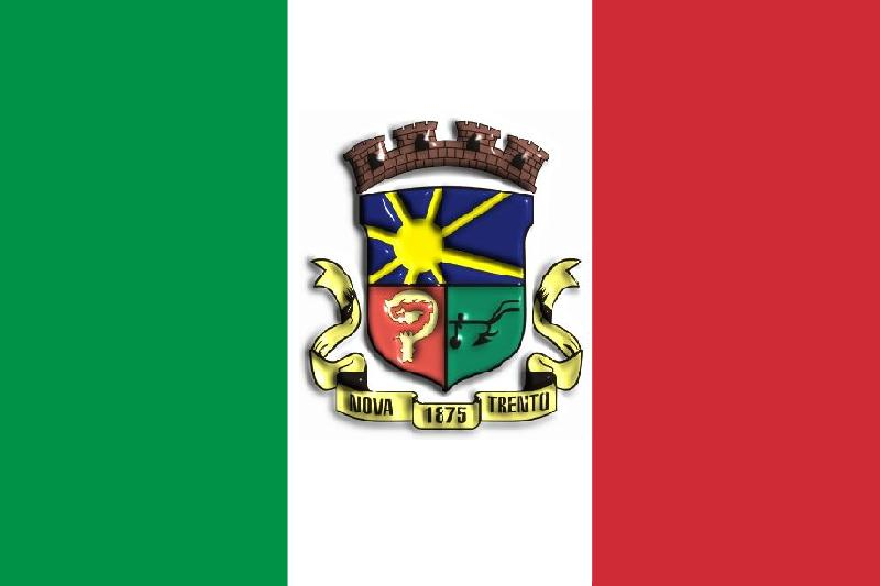 A Lei Municipal nº 487, sancionada pelo então prefeito municipal, Eurides Battisti, cria a bandeira oficial do município de Nova Trento, em 23 de agosto de 1973. As cores oficializadas são verde, branca e vermelha, inspiradas nas cores da bandeira da Itália e traz no centro o brasão, constituído anteriormente pela Lei Municipal nº 397 de 30 de novembro de 1968, sancionada pelo prefeito municipal, sr. Pedro Piva Júnior.